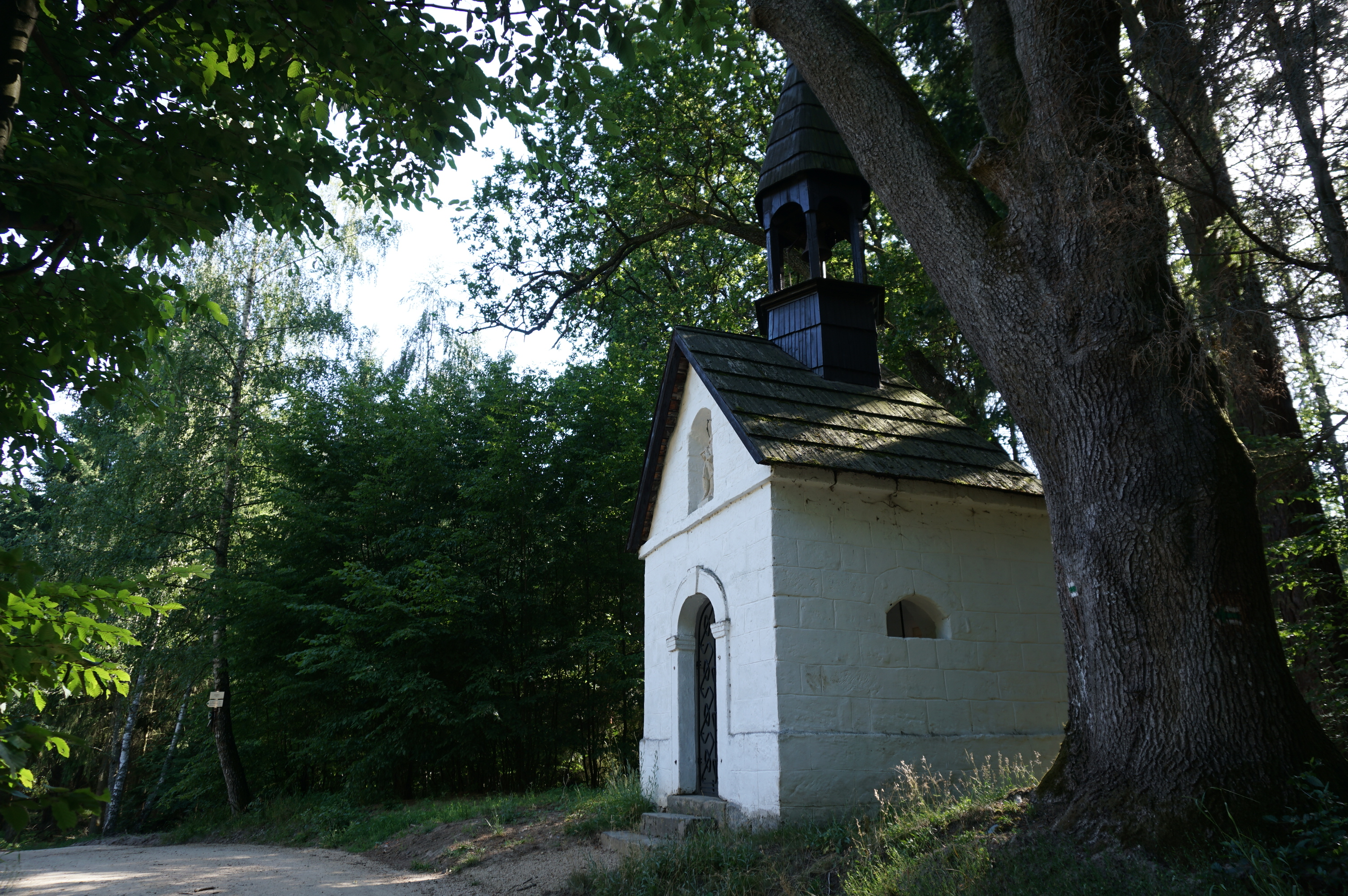 Zvonice, Na Radči, pp. 74, Kacanovy.